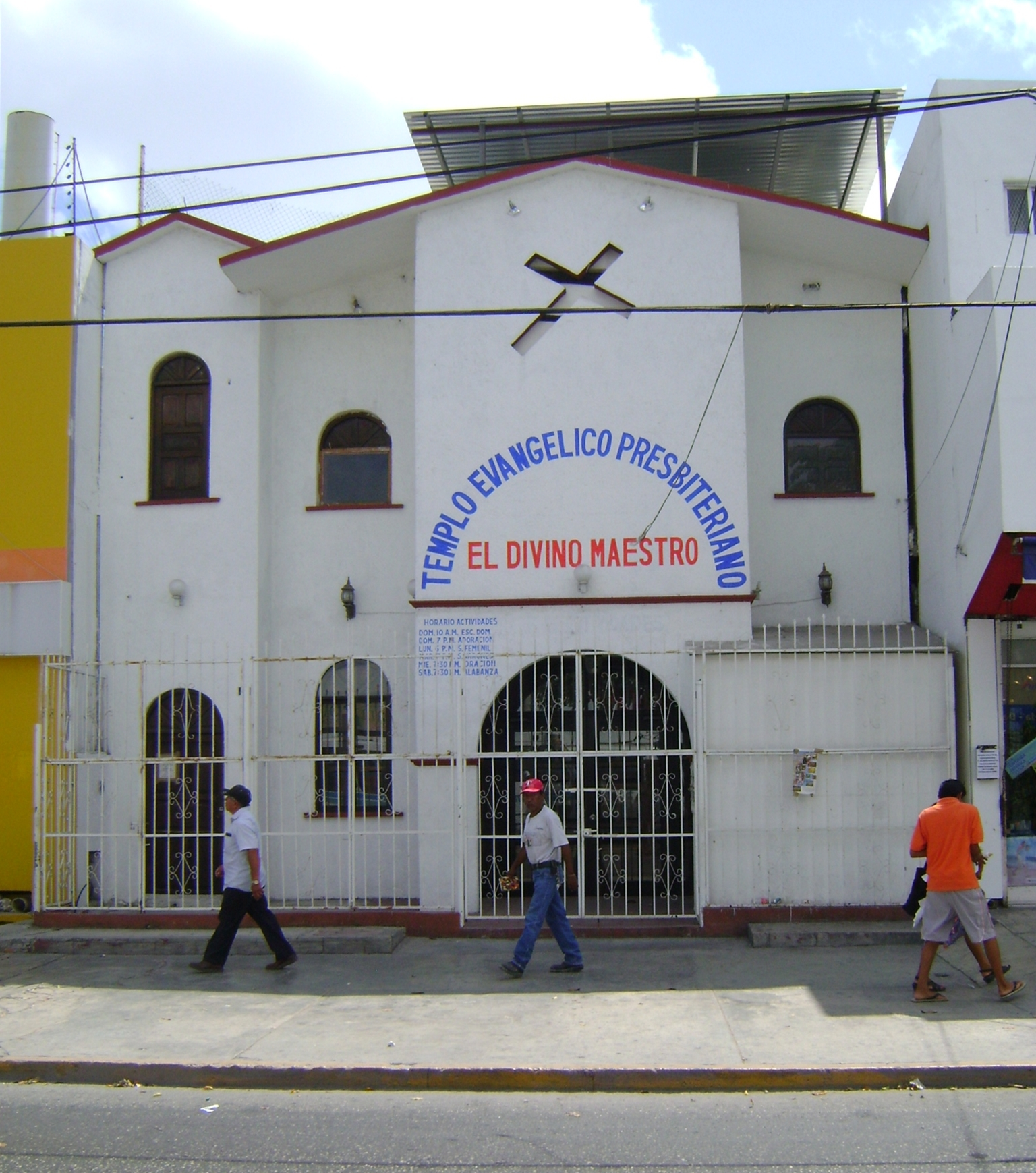 Templo Evangélico Presbiteriano El Divino Maestro Av. Tulum SM. 64 Mza. 8 Lte. 15 No. 29 De: Alianza de Iglesias Presbiterianas El Divino Maestro de Cancún, A.R.